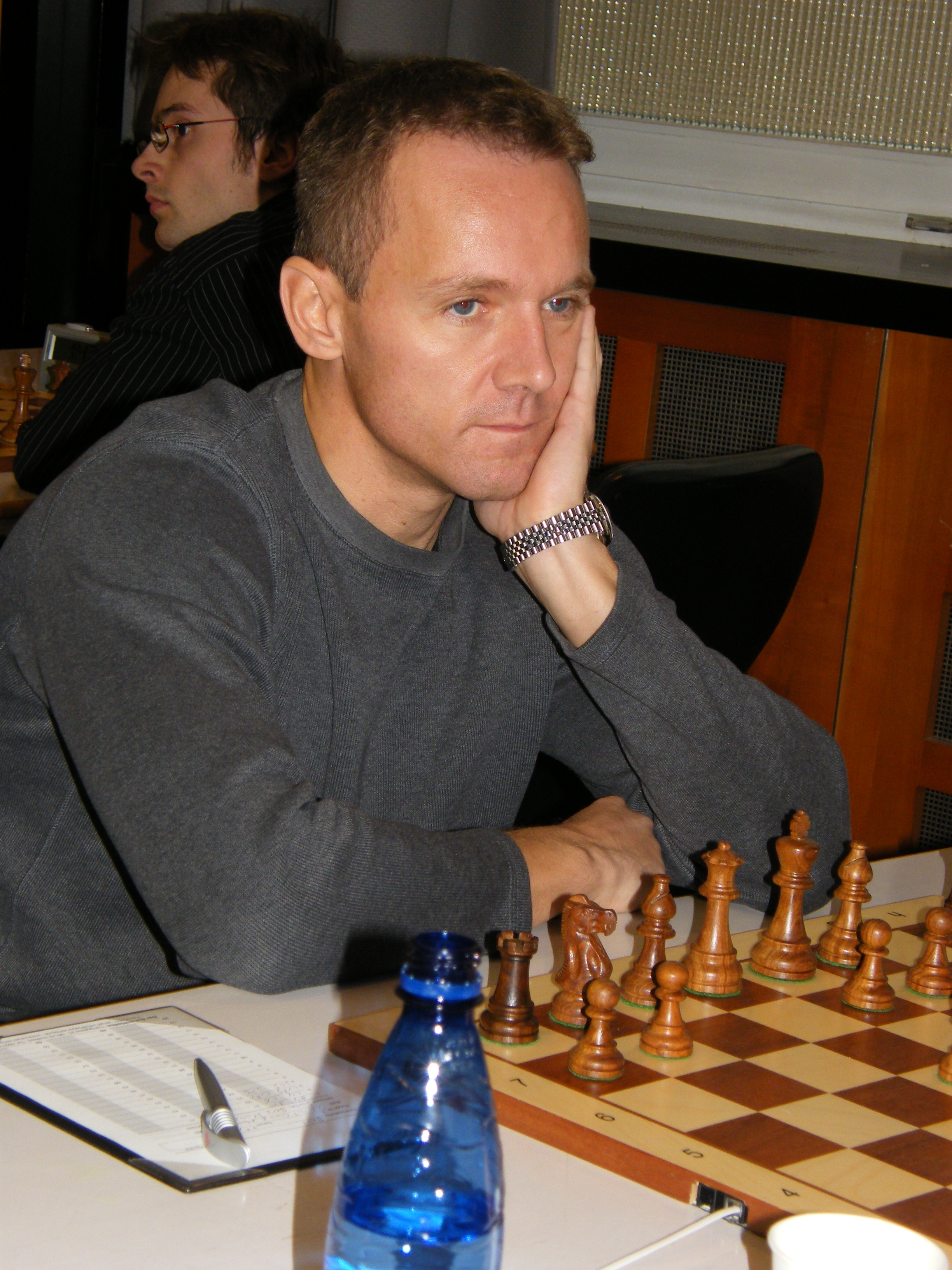 Sune Berg Hansen bei der 3. Runde der Schach-Bundesliga 2008/09 im Rathaus Schöneberg in Berlin